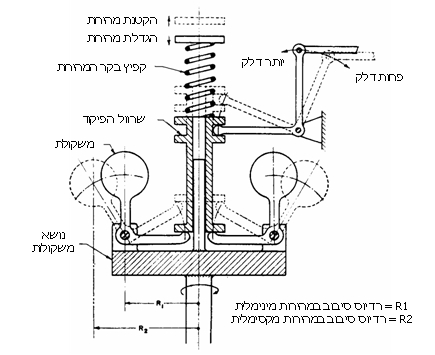 וסת צנטריפוגלי מכני - מקור התמונה הוא ספר לימוד של הצי האמריקני מ-1945 ושמו: Fundamentals of Diesel Engines - U.S. Navy עמ' 91.